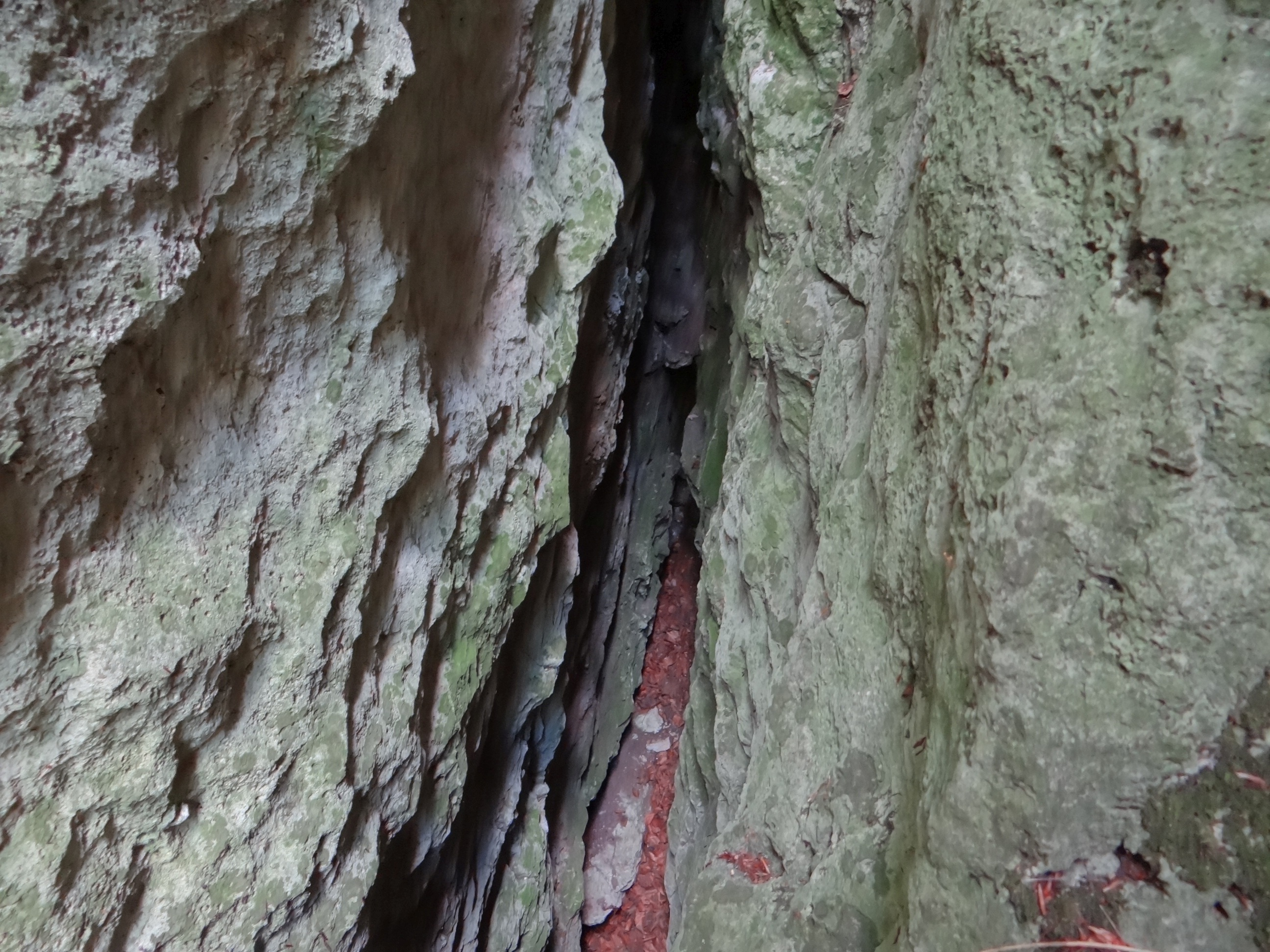 Jaskinia Jaroszowska